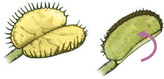 Simonastias